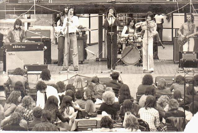 Az M7 együttes - koncert-felvétel. Budai Ifjúsági Park.